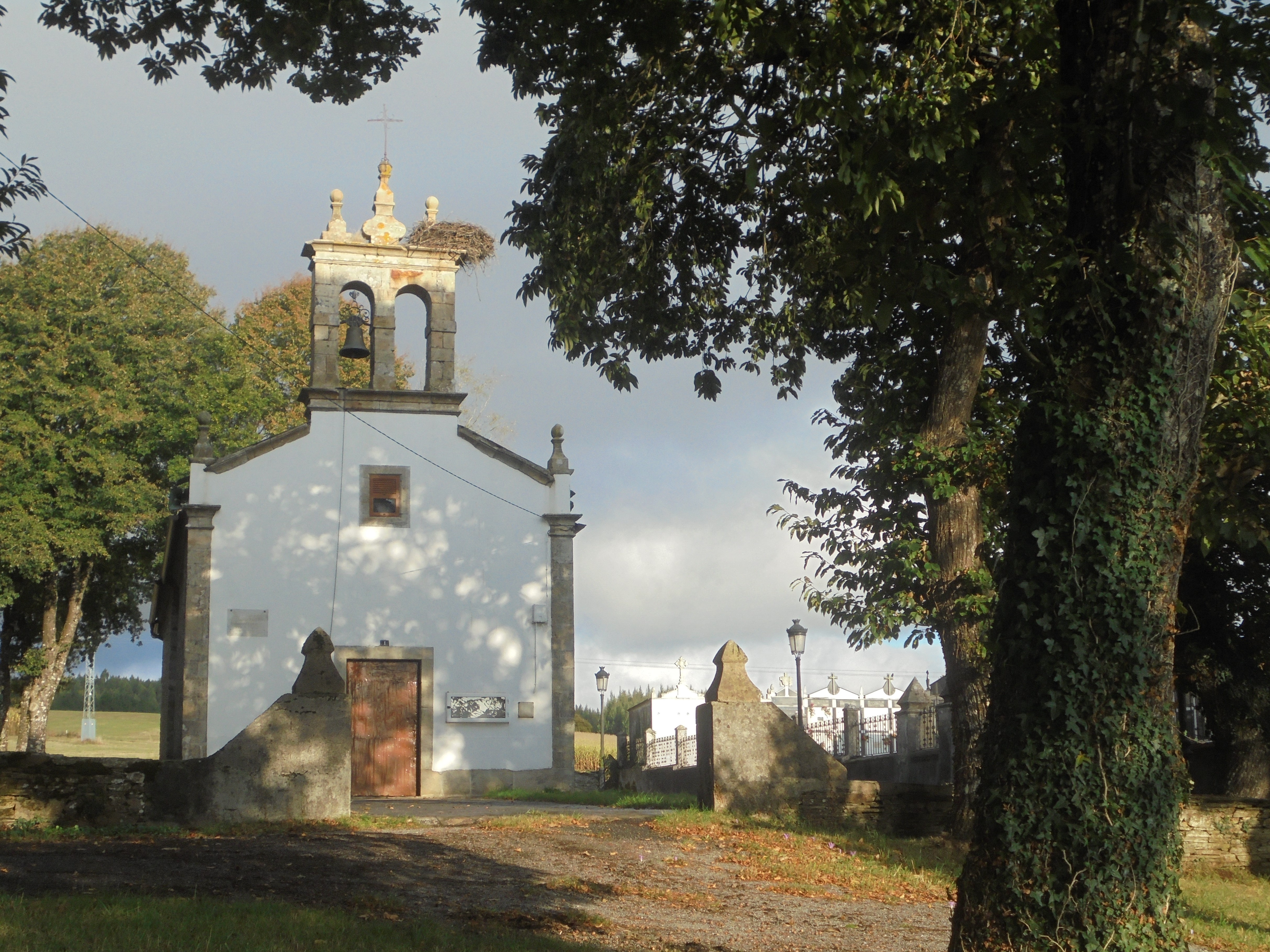 Igrexa parroquial de Torneiros ( Pol)